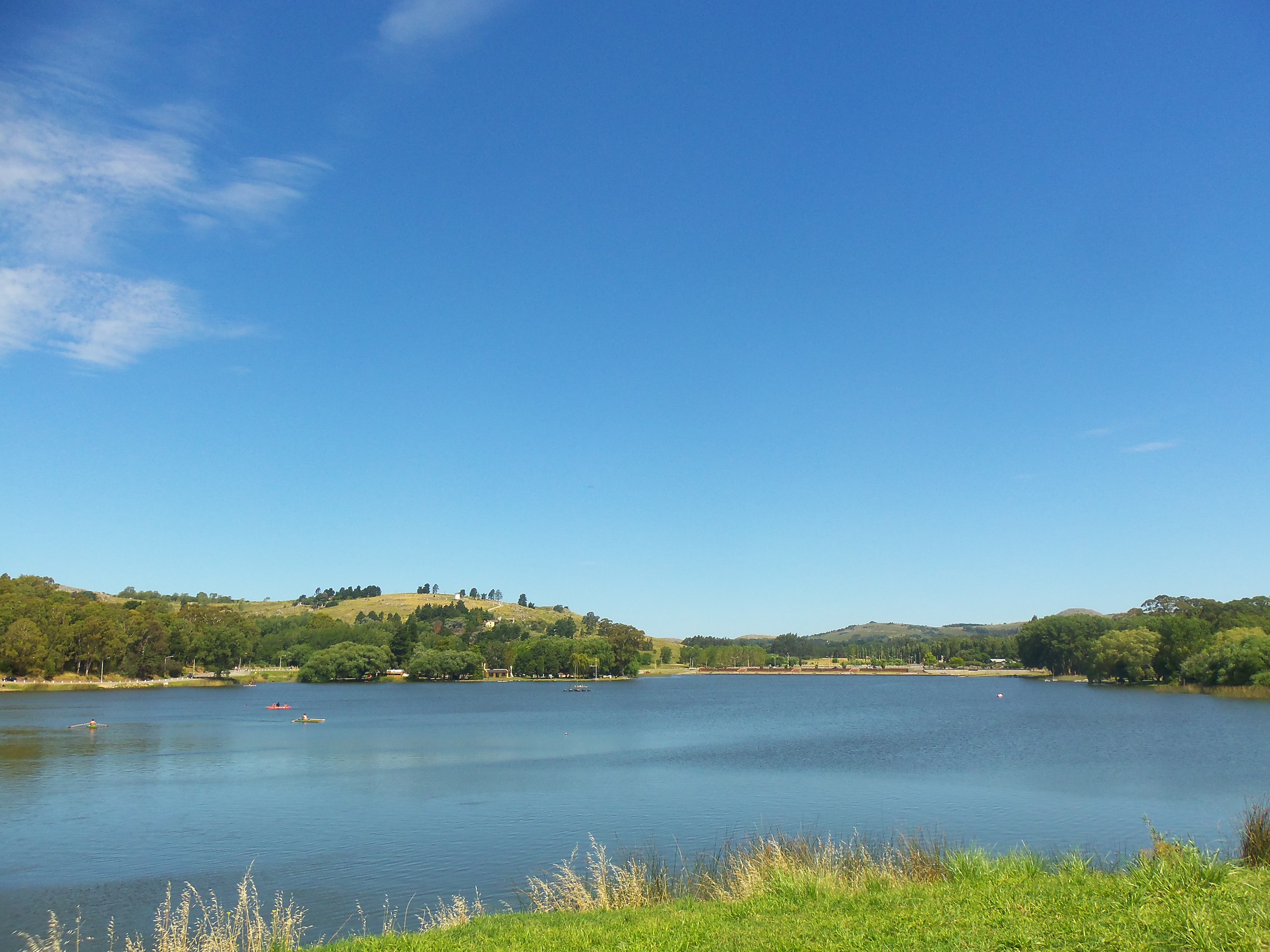 Vista del Lago del Fuerte, Tandil, Argentina